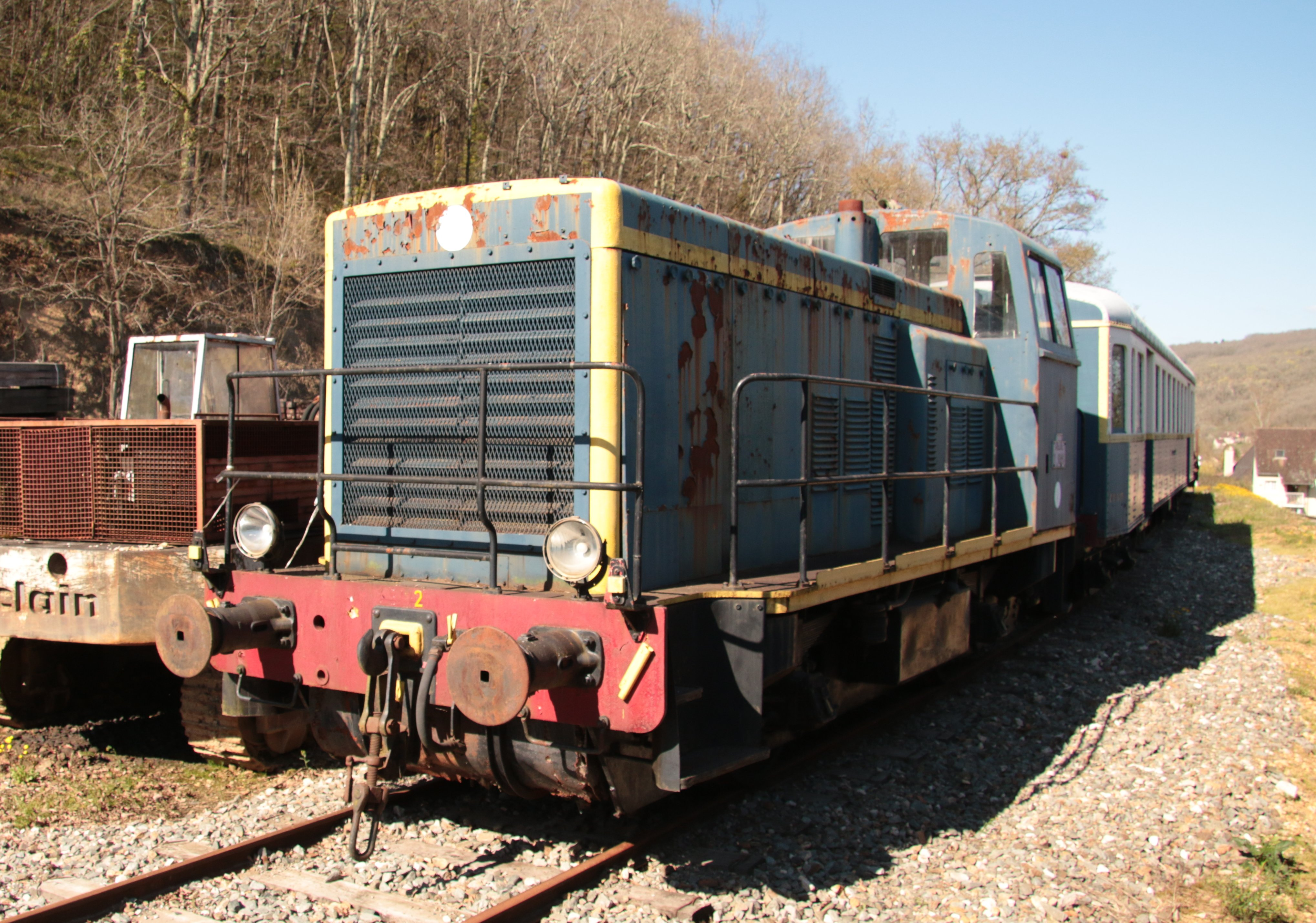 Le locomoteur ex-SNCF Y 51125 du Chemin de fer touristique du Haut Quercy.